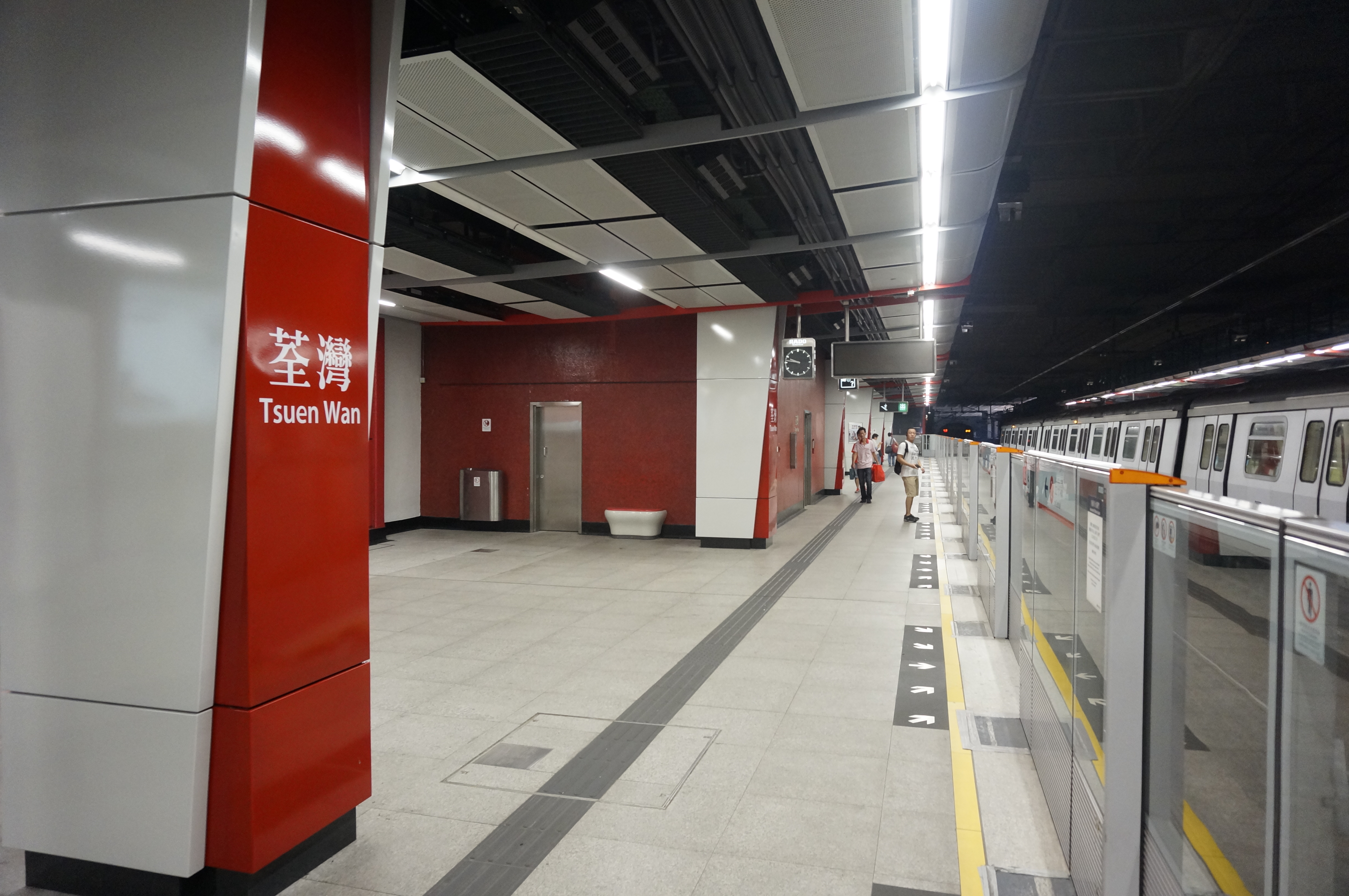 港鐵荃灣站月台